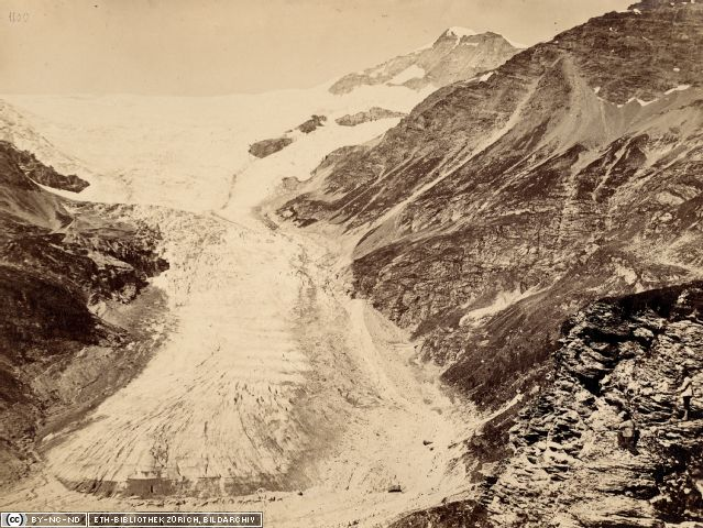 Palügletscher, aufgenommen von Alp Grüm von Adolphe Braun 1867. ETH-Bibliothek Zürich, Bildarchiv.